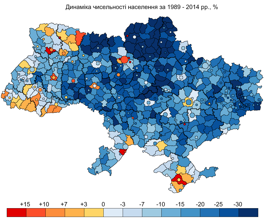 Динаміка населення районів України за 1989 - 2014 рр. / Population dynamics in Ukraine in 1989 - 2014